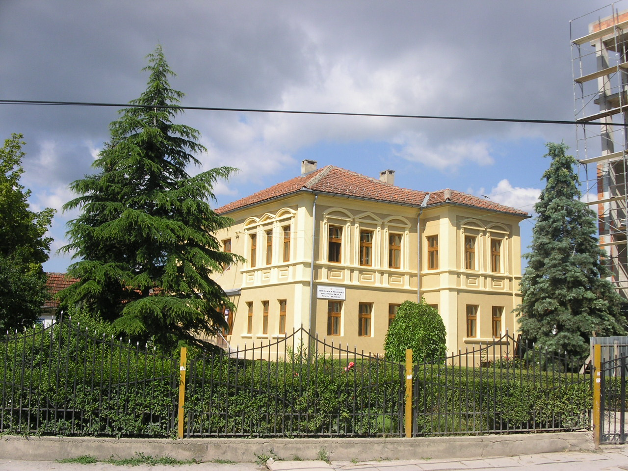 Shkolla e muzikes